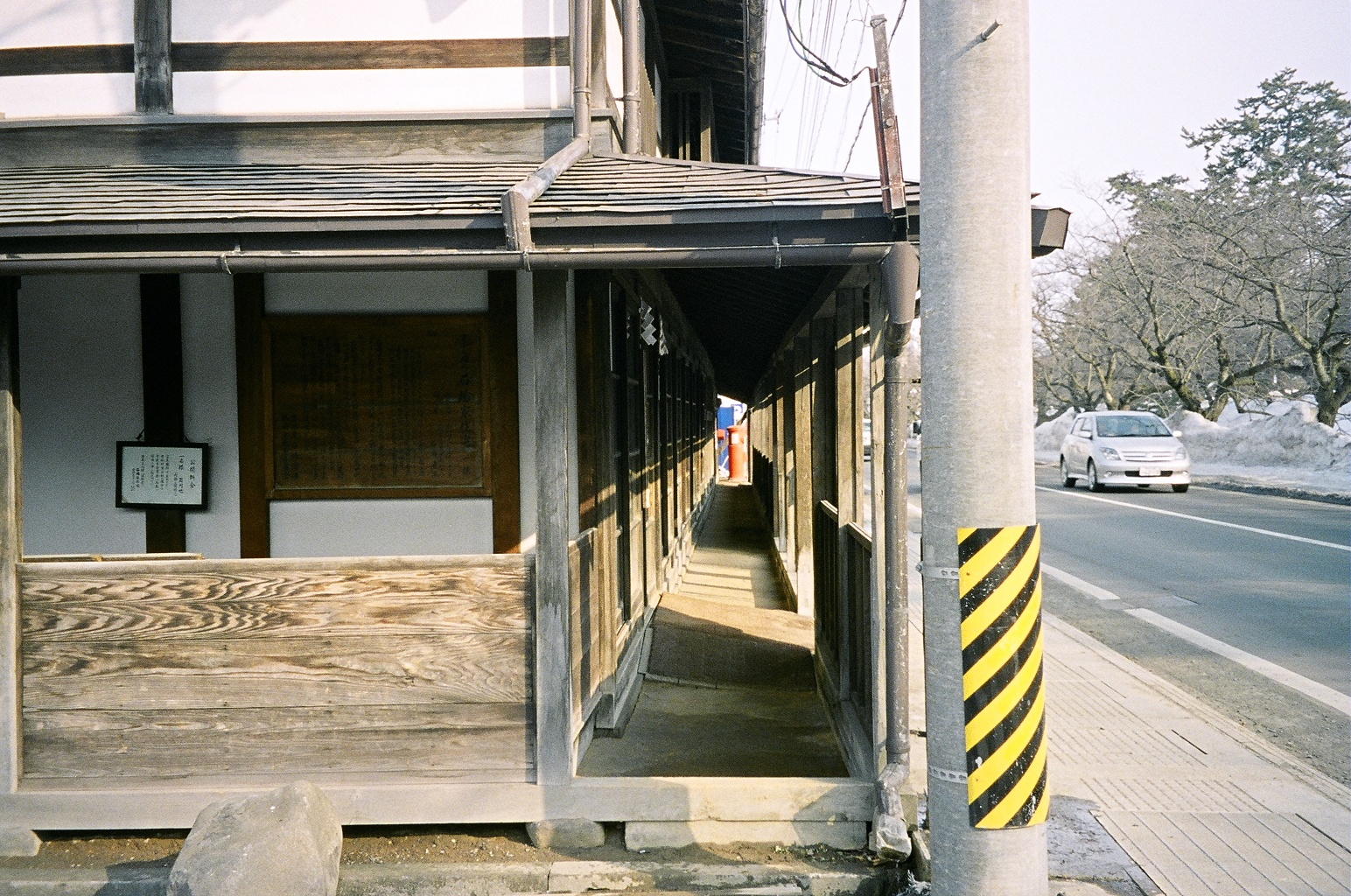 青森県弘前市、雁木造（こみせ）の建物